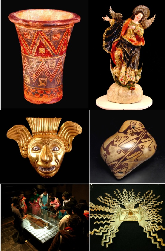 15 mil años de historia ecuatoriana.